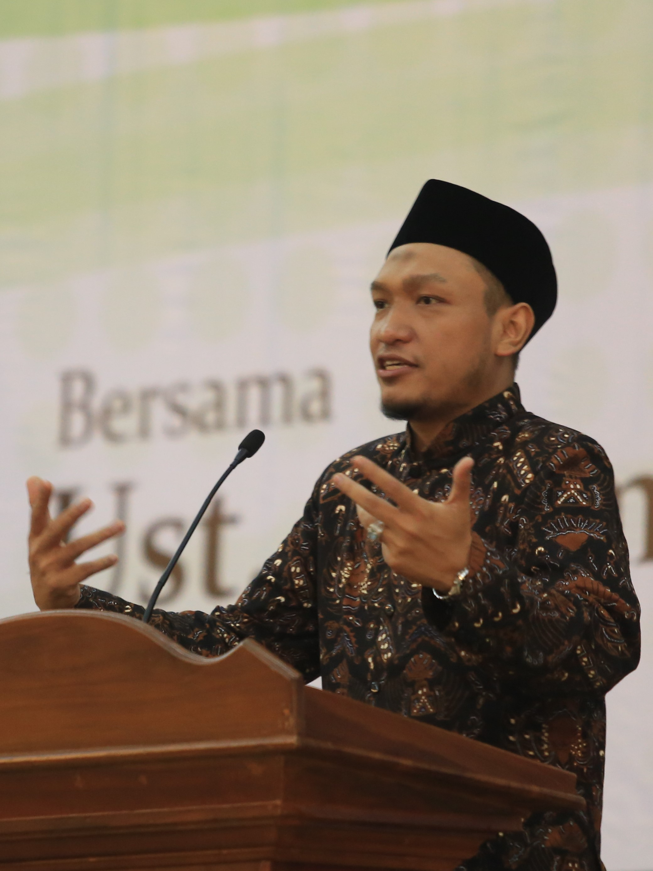 Salim A Fillah Jogokaryan